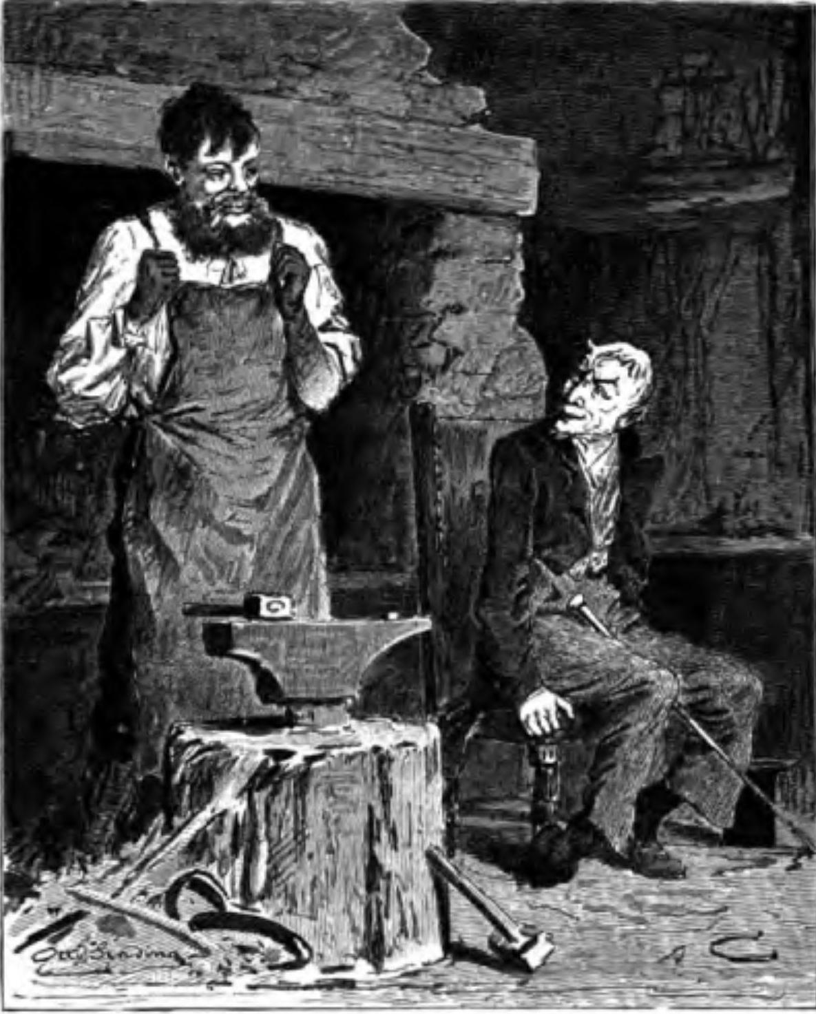 Illustrasjon til Smeden de ikke torde å slippe inn i Helvetet